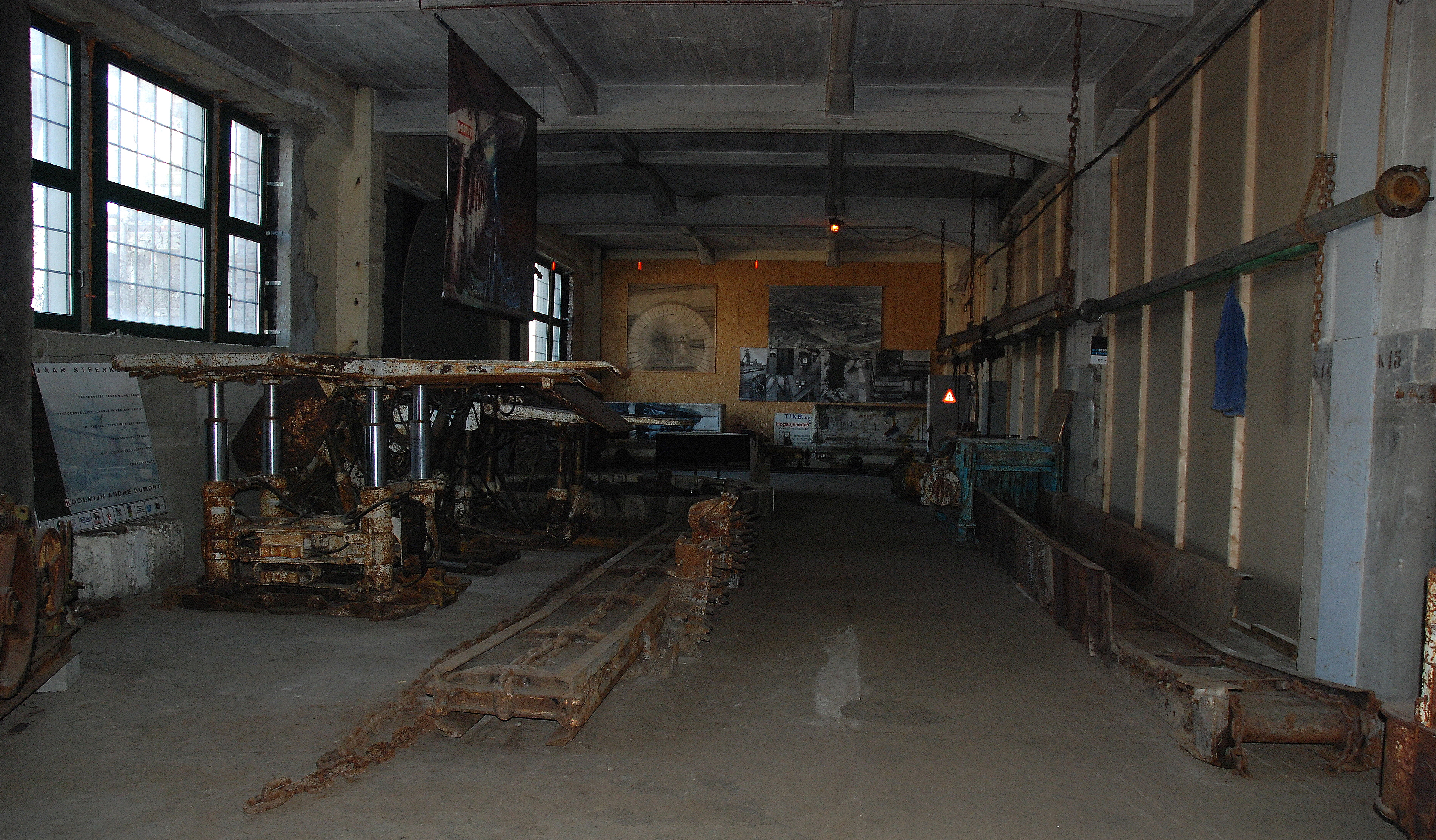 Het Mijndepot in de voormalige steenkoolmijn van Waterschei